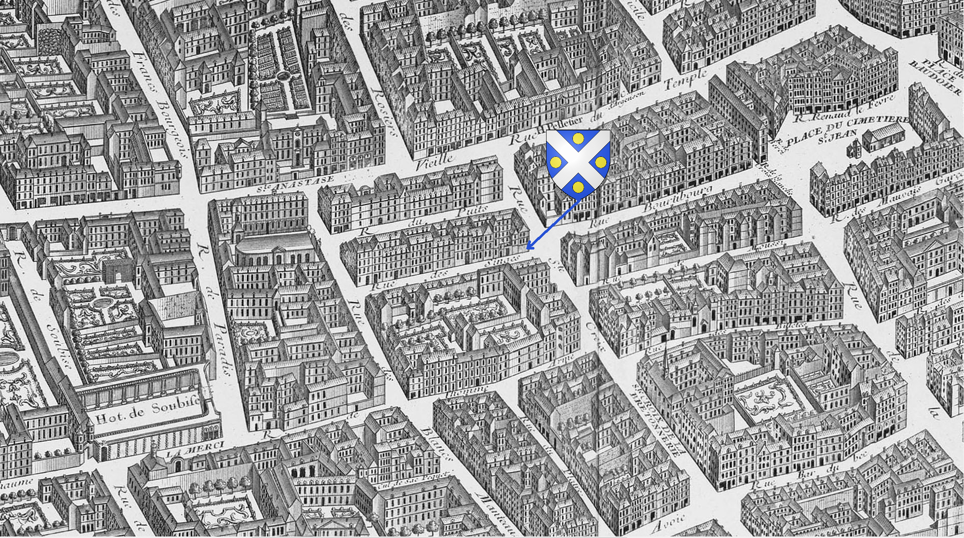 Blason Famille Dodart sur plan de Turgot, avec flèche indiquant la maison de la famille, habité au XVIIe siècle par Denis Dodart, Claude-Jean-Baptiste Dodart et Guillaume Homberg.